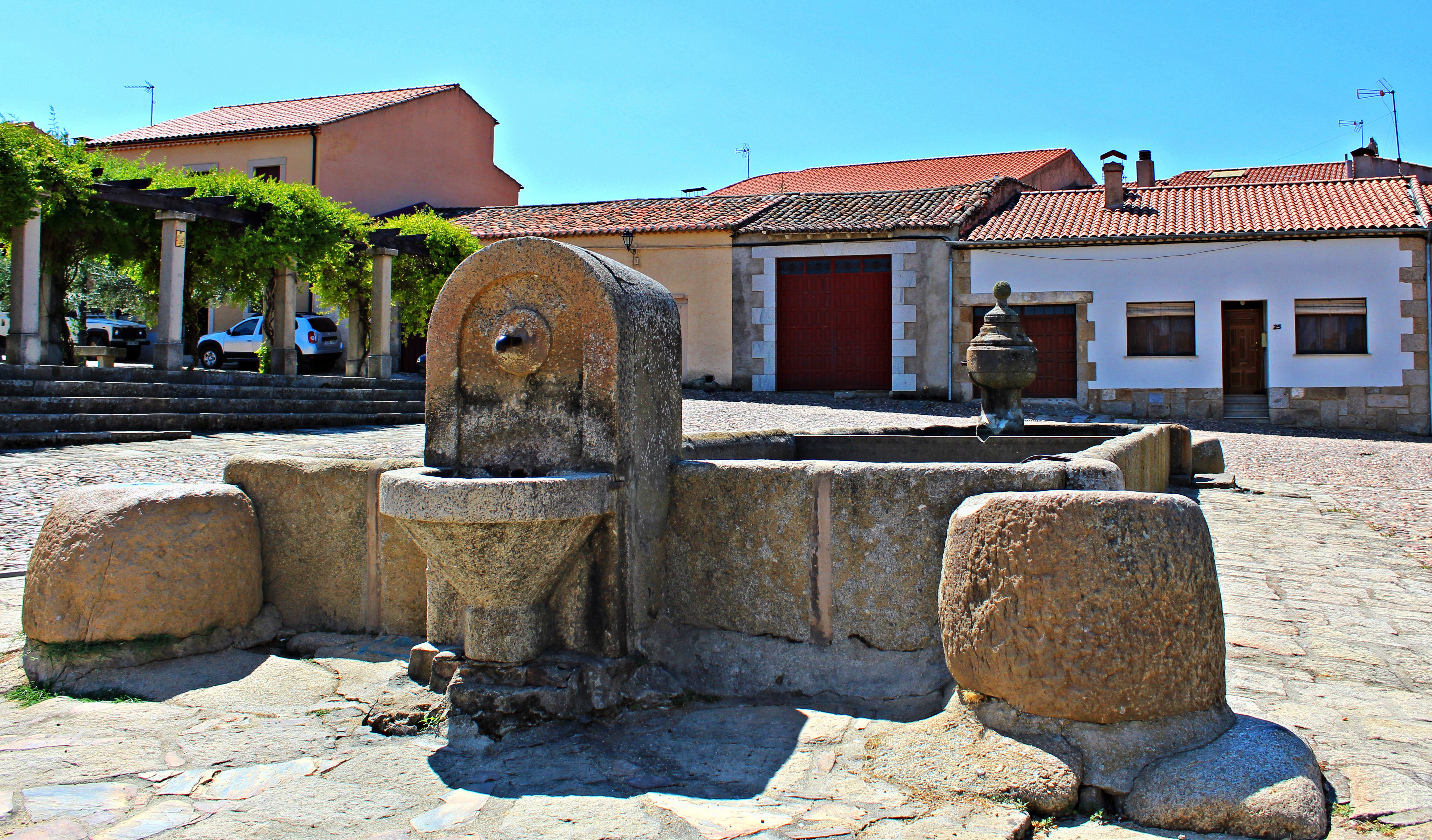 Fuente en San Felices de Gallegos en la provincia de Salamanca